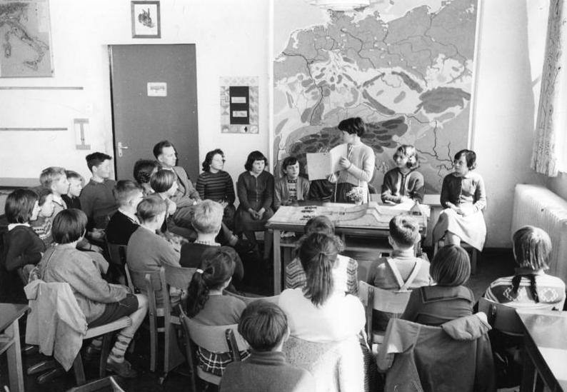 Jügenheim bei Seeheim, Schuldorf an der Bergstrasse Den Kindern sollen keine trockenen Lehrsätze "eingepauckt" werden, in selbständiger Arbeit sollen sie sich mit den Bildungsgütern auseinandersetzten. Diesem Ziel dient der Gruppenunterricht. Hier berichtet der Gruppensprecher einer Gruppe der Klasse über die geleistete Arbeit. Information added by Wikimedia users.Schuldorf Bergstraße in Seeheim-Jugenheim, Hessen